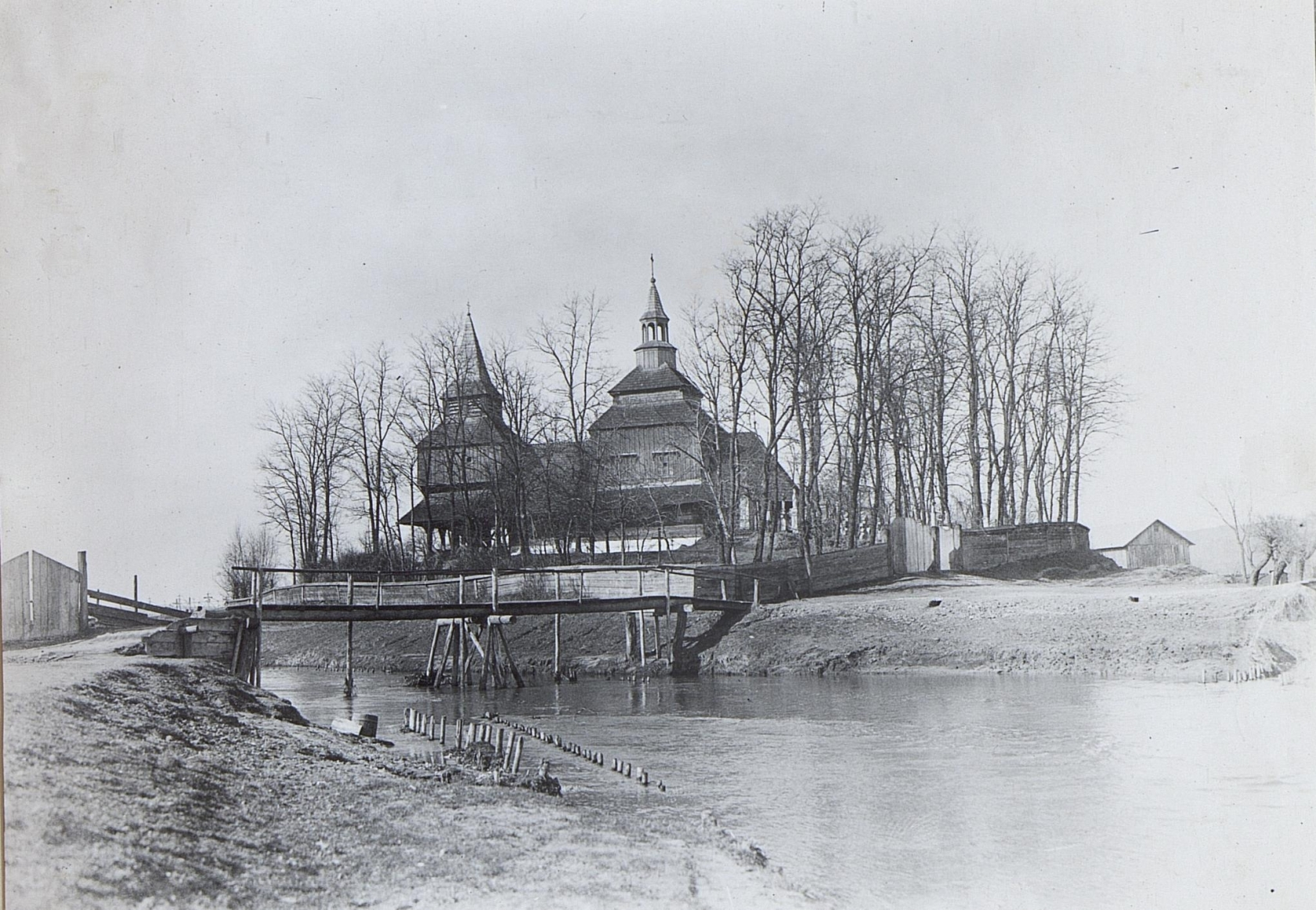 Alte gr.k.Kirche in Rohatyn.